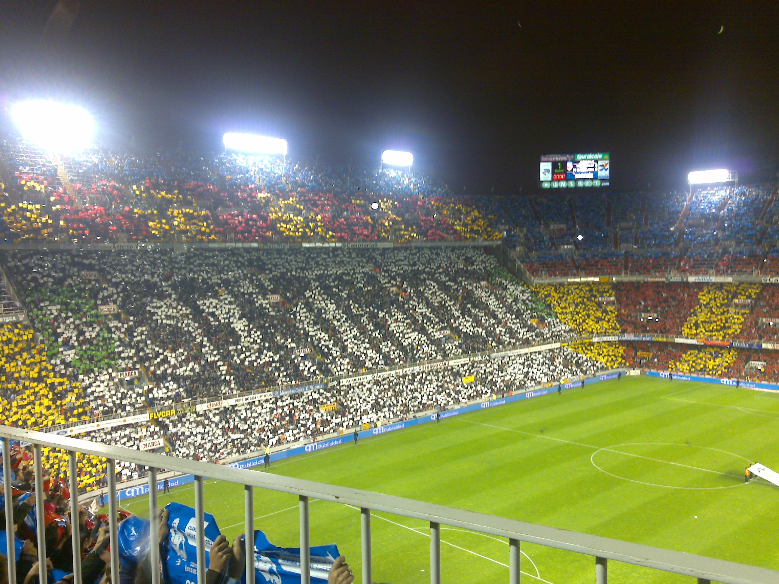 Mosaic preparat a Mestalla per a rebre la visita del Barça en la Lliga de 2009.